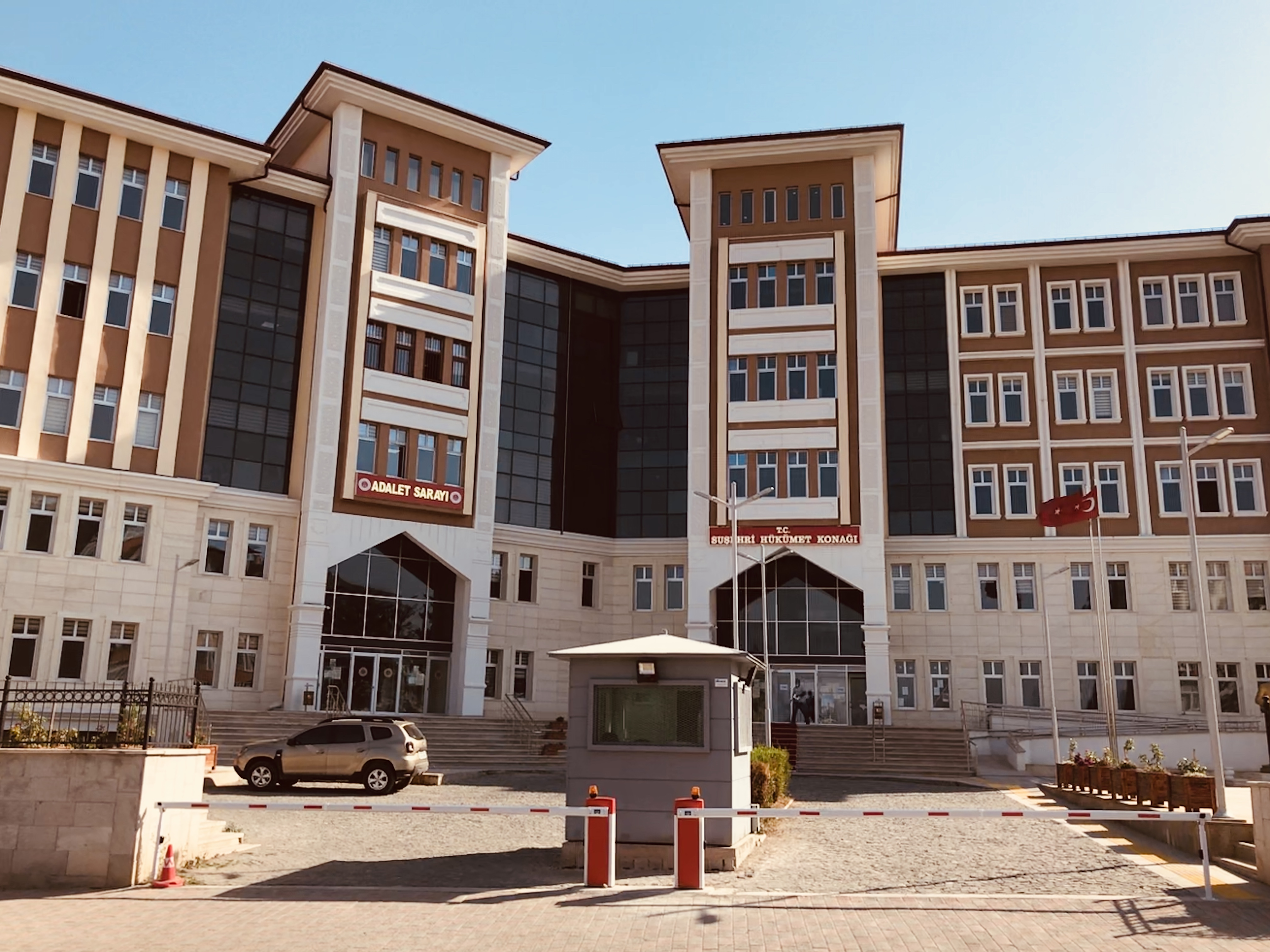 Suşehri Hükümet Konağı, Sivas, Türkiye.